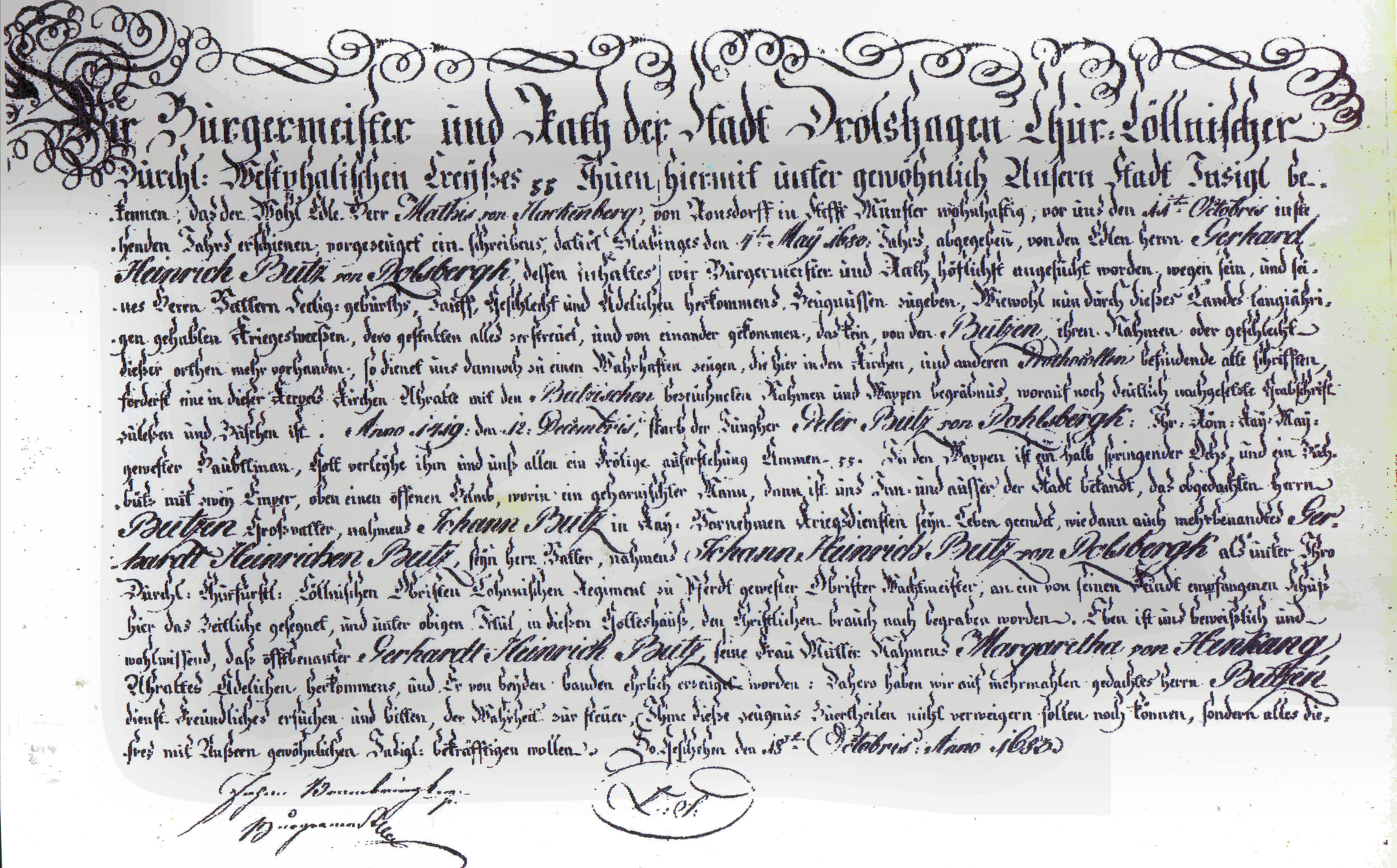 Dokument der Stadt Drolshagen vom 18.10.1683 über die Herkunft der Putz von Rolsberg bis zu Peter Butz von Rohlsbergh von 1419